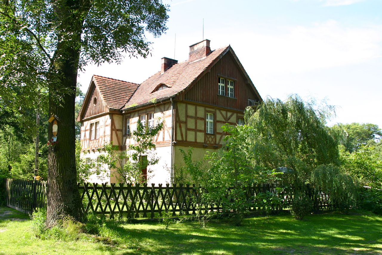 Urszulanowice (dodatkowa nazwa w j. niem. Ursulanowitz) – przysiółek w Polsce położony w województwie opolskim, w powiecie krapkowickim, w gminie Strzeleczki.